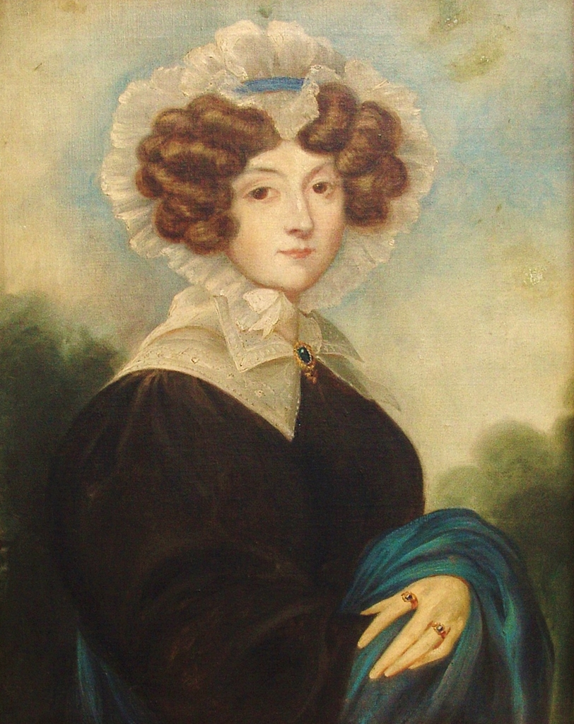 Zofia Helena Karolina Zobel 1807-1863